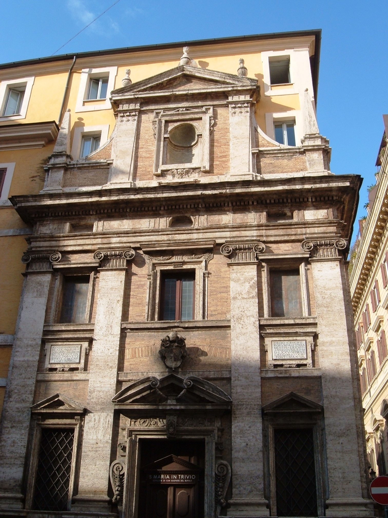 Facciata della chiesa di Santa Maria in Trivio a Roma.